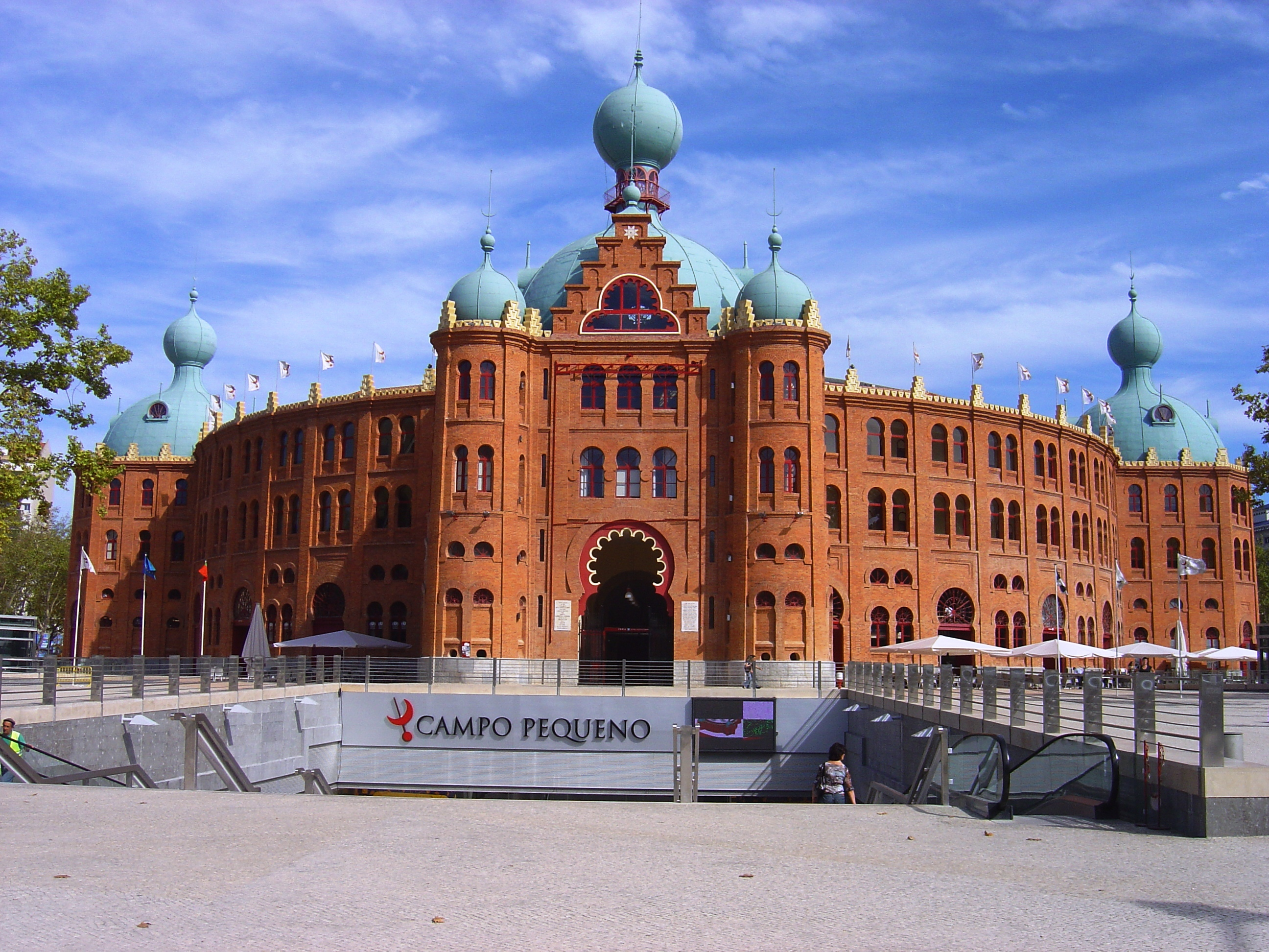 Campo Pequeno, Lisbon, Portugal